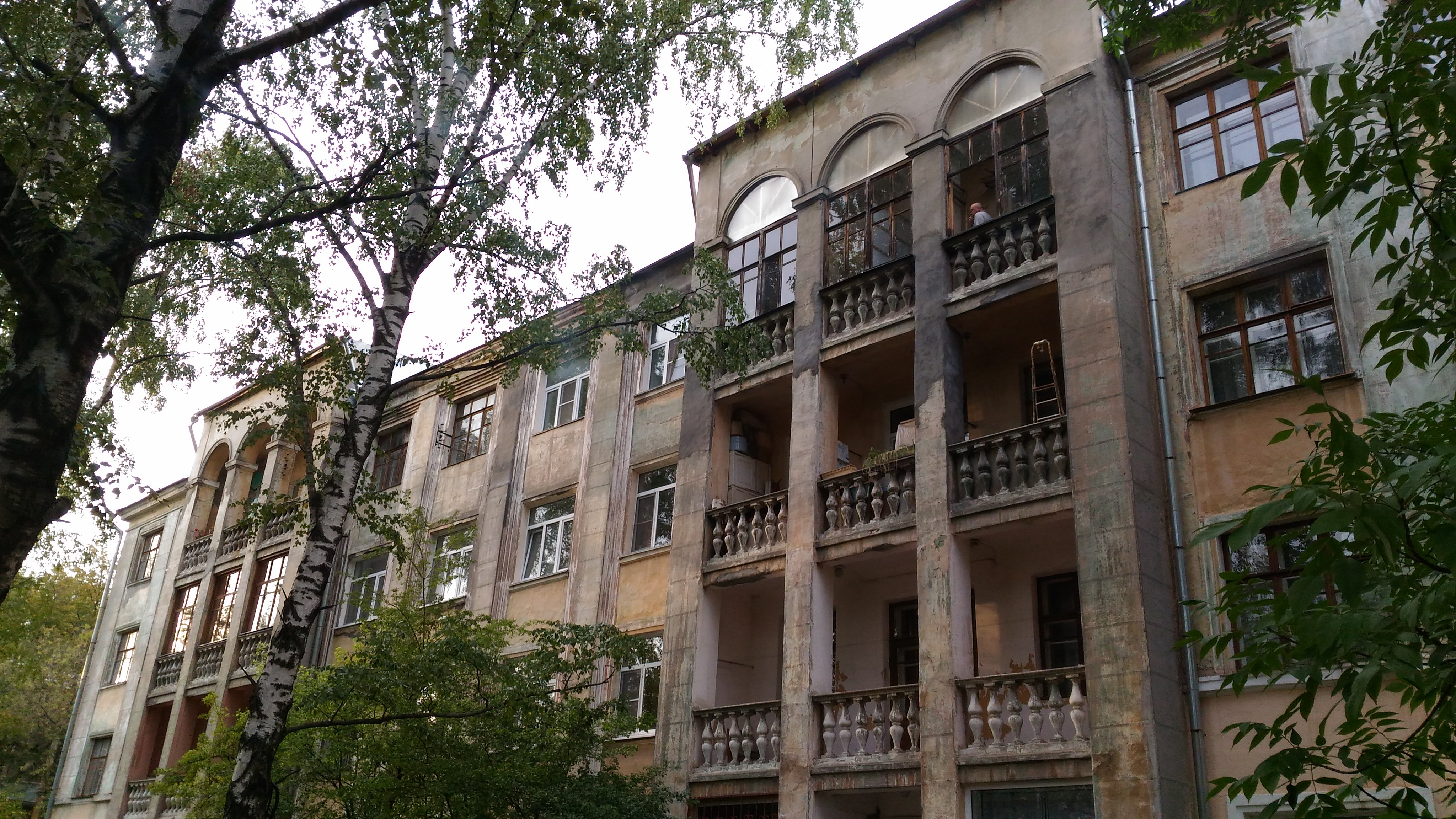 Нижний Новгород. Жилой дом в посёлке Калининский (ул. Безрукова, 6)